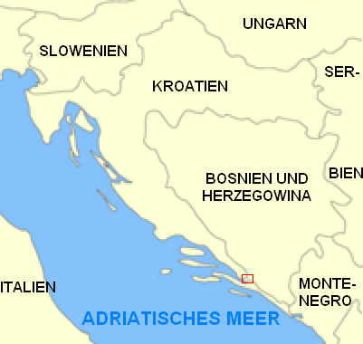 Adriaküste; Küste von Bosnien und Herzegowina hervorgehoben Bearbeiter: Benutzer:Axo